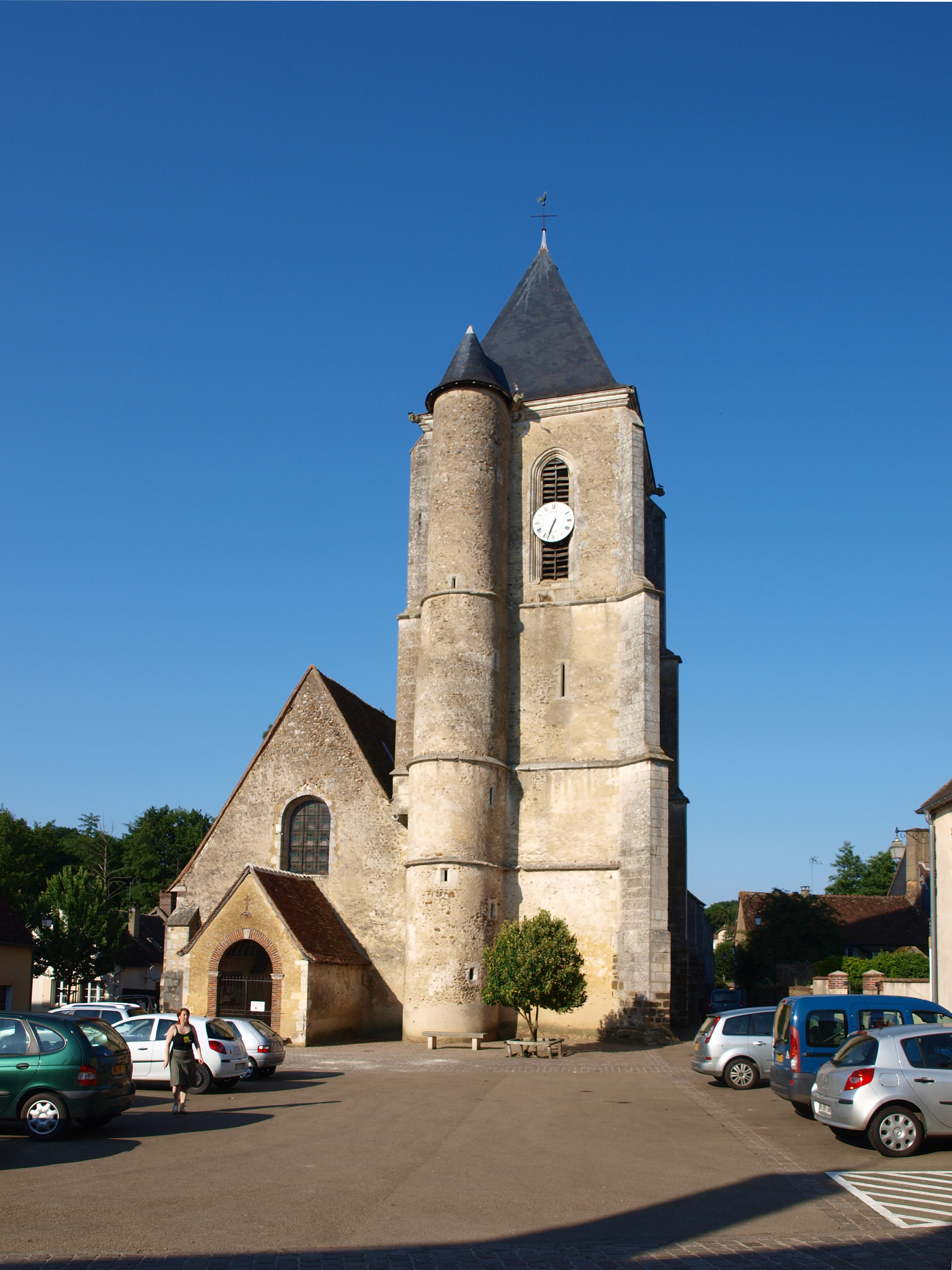 Mézilles (Yonne, France) ; église